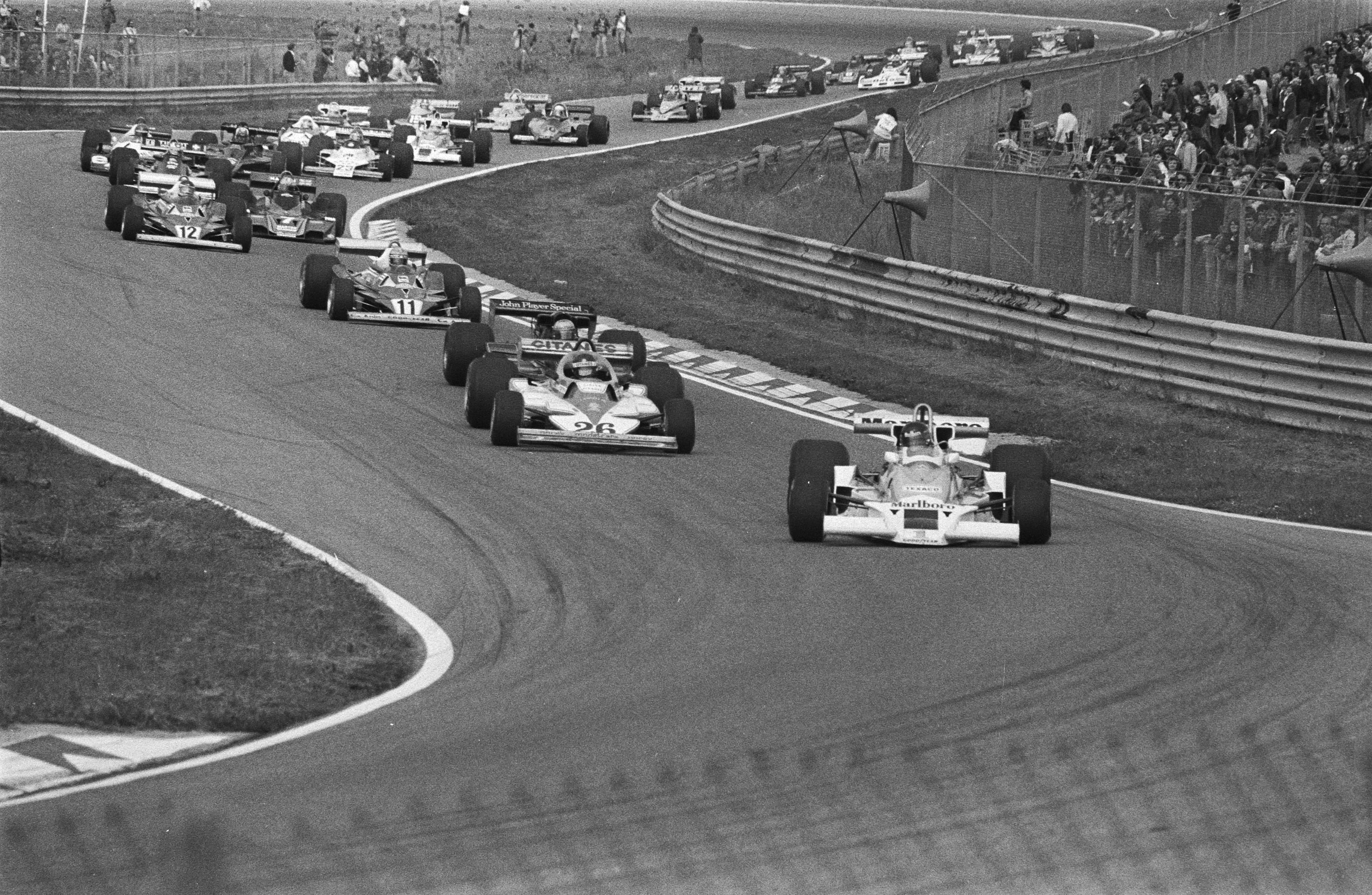 Collectie / Archief : Fotocollectie Anefo Reportage / Serie : [ onbekend ] Beschrijving : Grand Prix Zandvoort; kort na de start met James Hunt op kop Datum : 28 augustus 1977 Locatie : Noord-Holland, Zandvoort Trefwoorden : autoraces Persoonsnaam : James Hunt Fotograaf : Suyk, Koen / Anefo Auteursrechthebbende : Nationaal Archief Materiaalsoort : Negatief (zwart/wit) Nummer archiefinventaris : bekijk toegang 2.24.01.05 Bestanddeelnummer : 929-3235